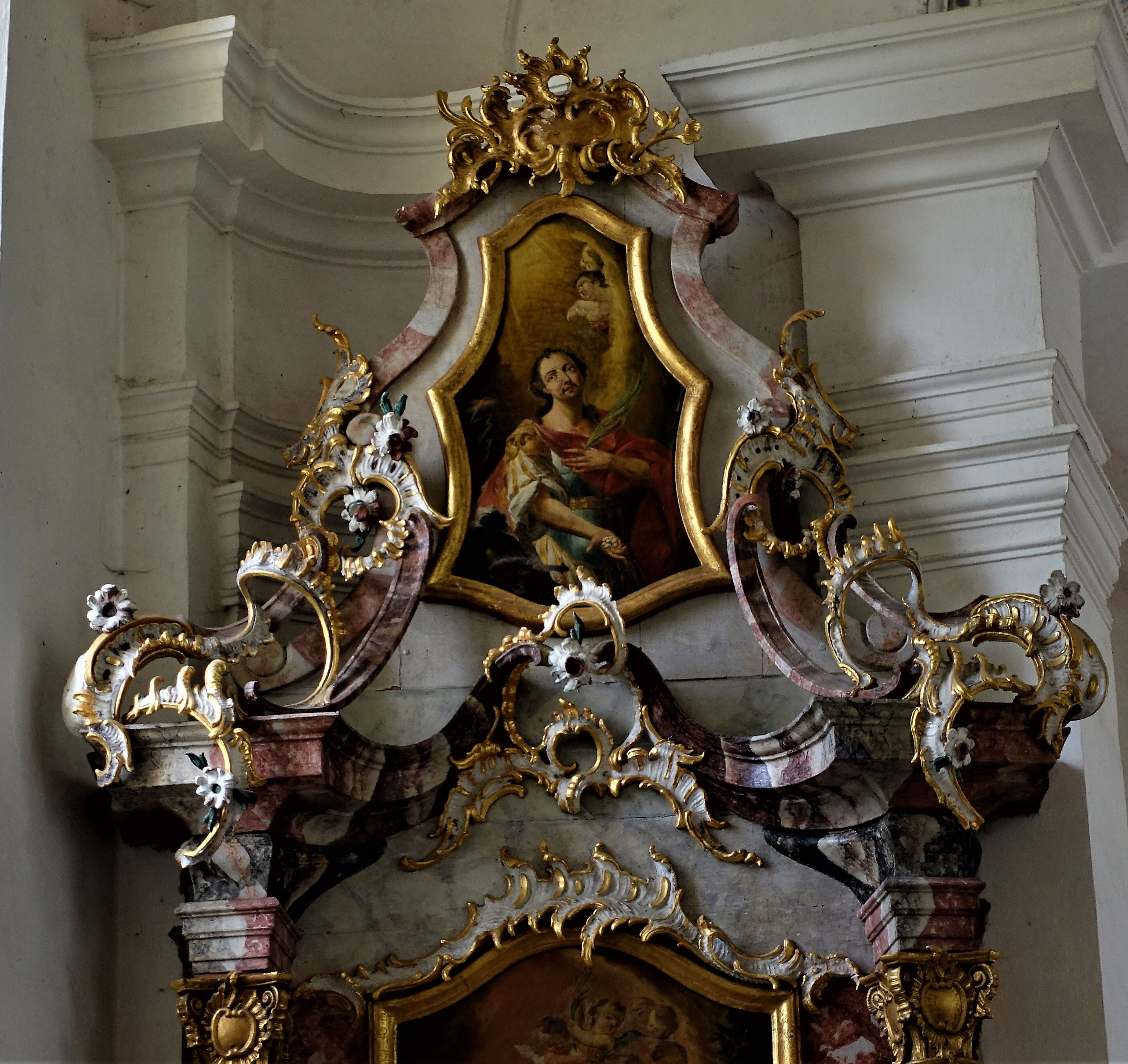 Rocailleaufsatz am Seitenaltar rechts, St.Johann, OppoldingThis is a photograph of an architectural monument.